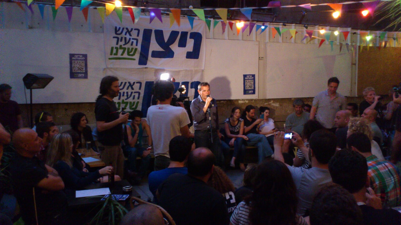 ניצן הורוביץ נואם בכנסת בחירות לראשות העיר תל-אביב יפו, 2013